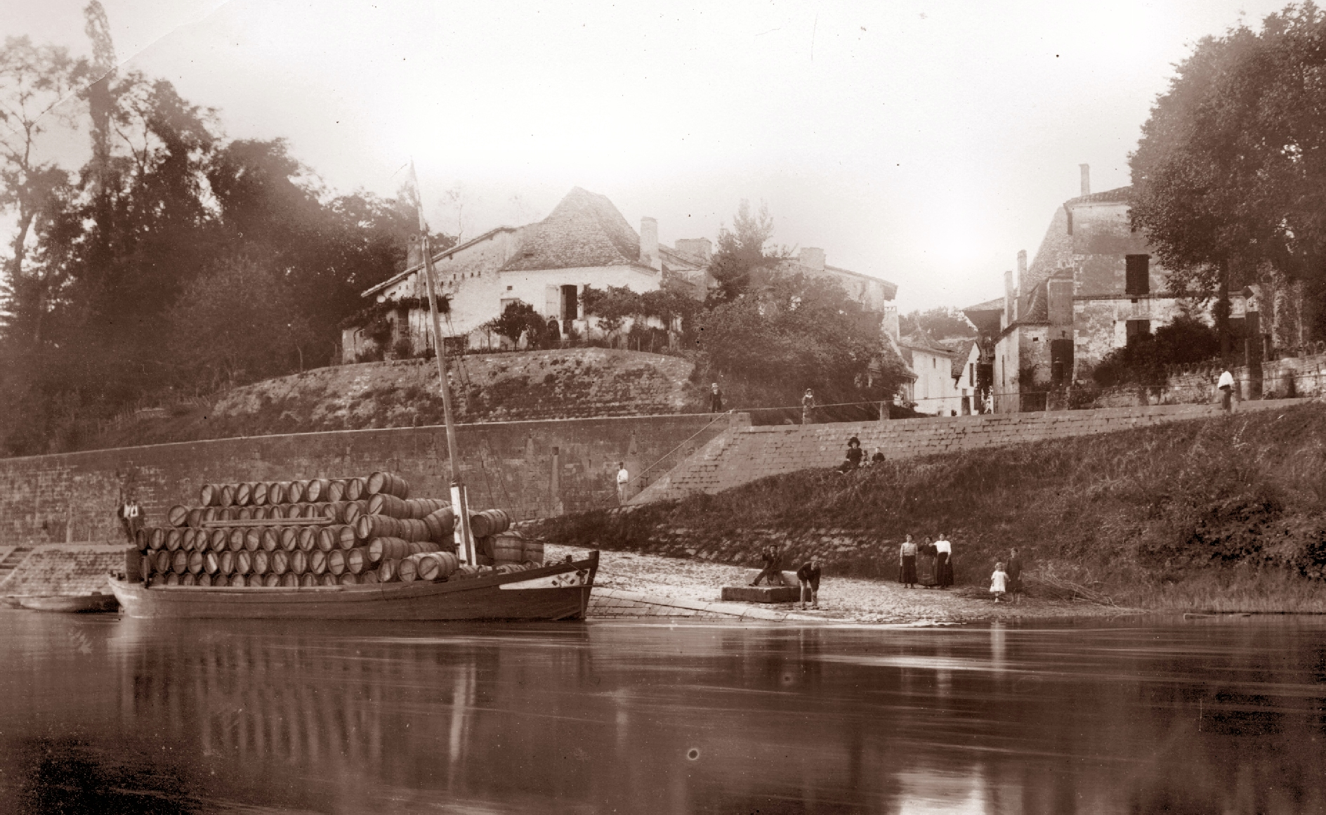 Vue du Port du Fleix en activité vers 1913. Détail d'une photographie de l'abbé Bernède